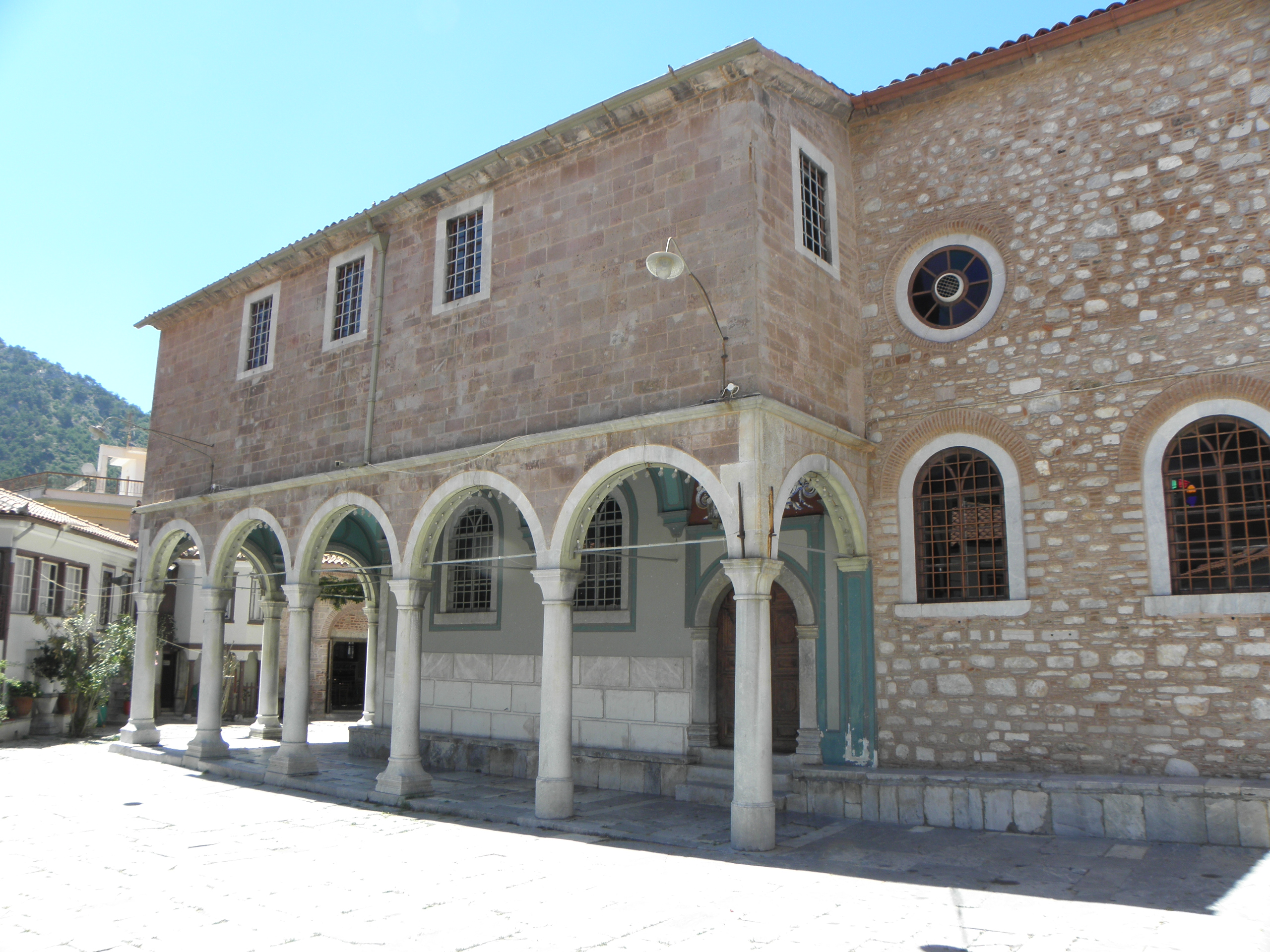 Agiassos, Lesbos